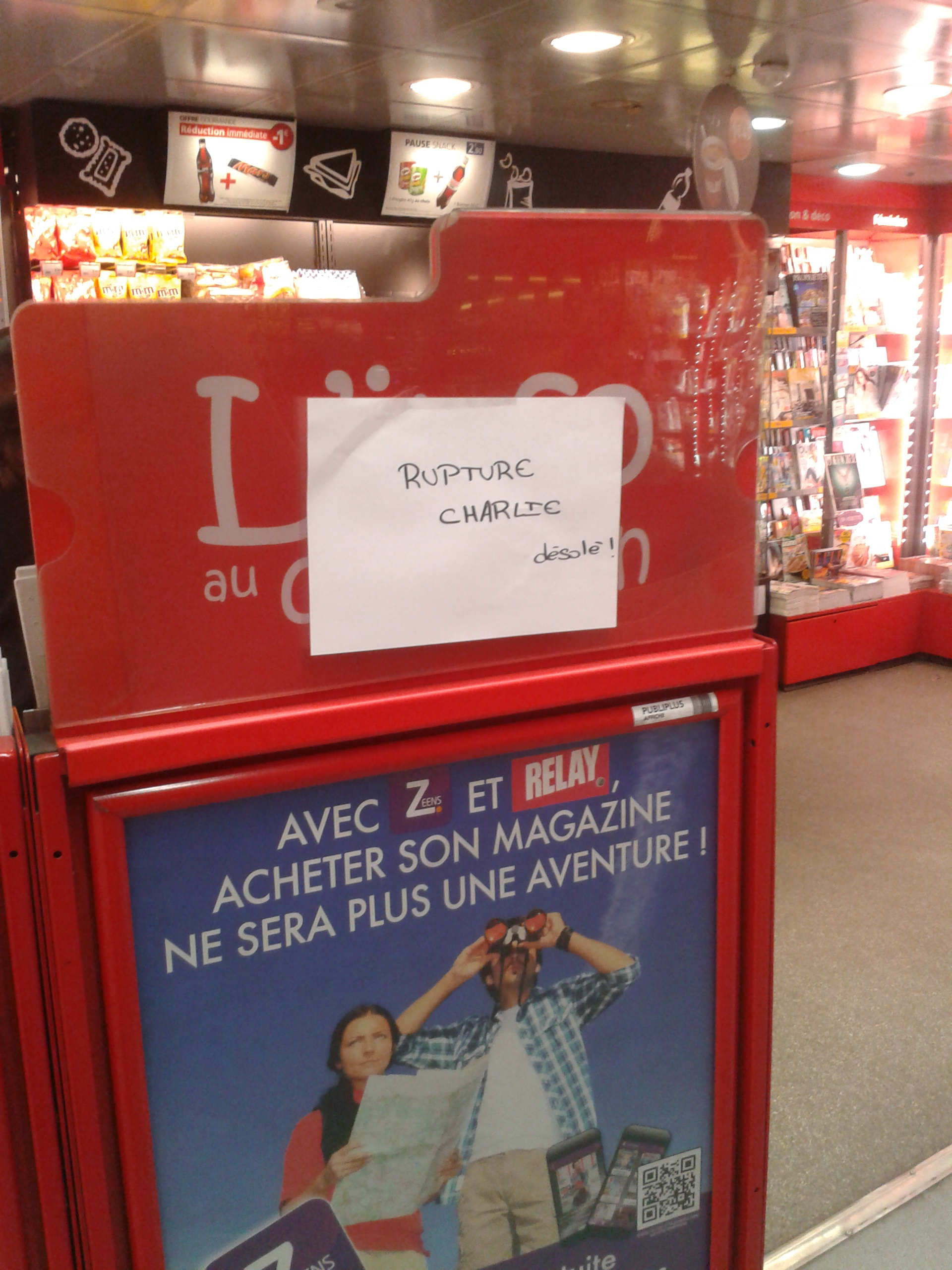 Affichette dans un kiosque d'une station du RER parisien, annonçant que le numéro 1178 de Charlie Hebdo est en rupture de stock.